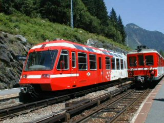 Description : une rame Z600 (à droite) et une rame Z800 (à gauche), en gare des Houches, sur la ligne Saint-Gervais-Vallorcine Source : photo prise par Christophe Jacquet en août 2001 Licence : Christophe Jacquet, 2001 Catégorie:Matériel roulant ferroviaire